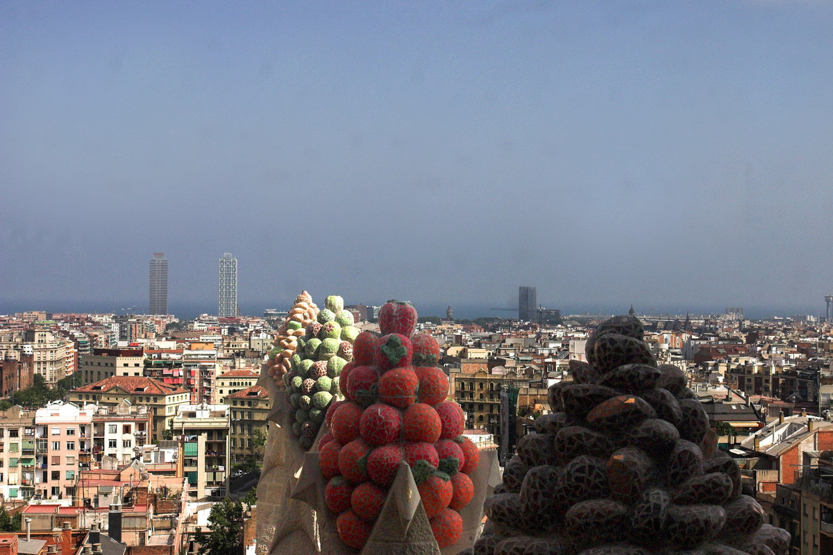 Pinacles del costat sud de la nau central decorats amb fruits. (Sagrada Familia-Barcelona-Catalunya)